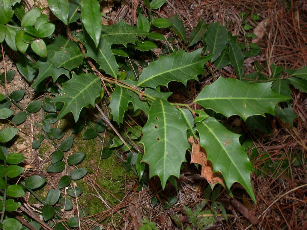 Itea oldhamii：ヒイラギズイナ 2004/08/11 沖縄島・名護市 Nafo city, Okinawa island